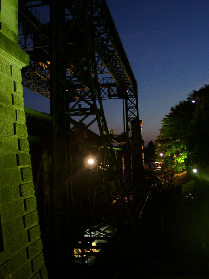 altes Schiffshebewerk Henrichenburg fotografiert von Runghold im Rahmen der Extraschicht 2003 um ca. 23.00 Uhr public domain